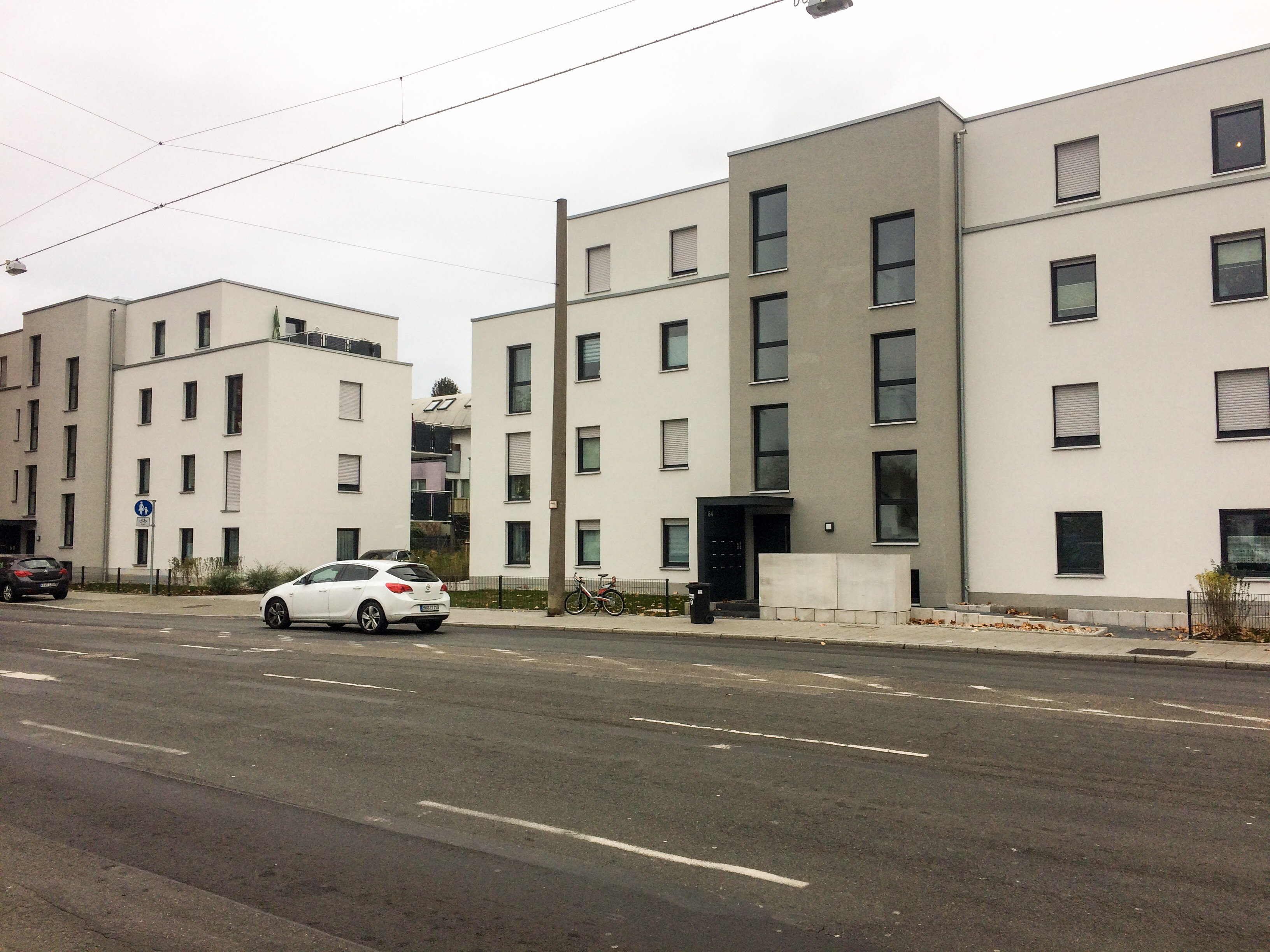 Neubauten anstelle der vormaligen Milchhofsiedlung